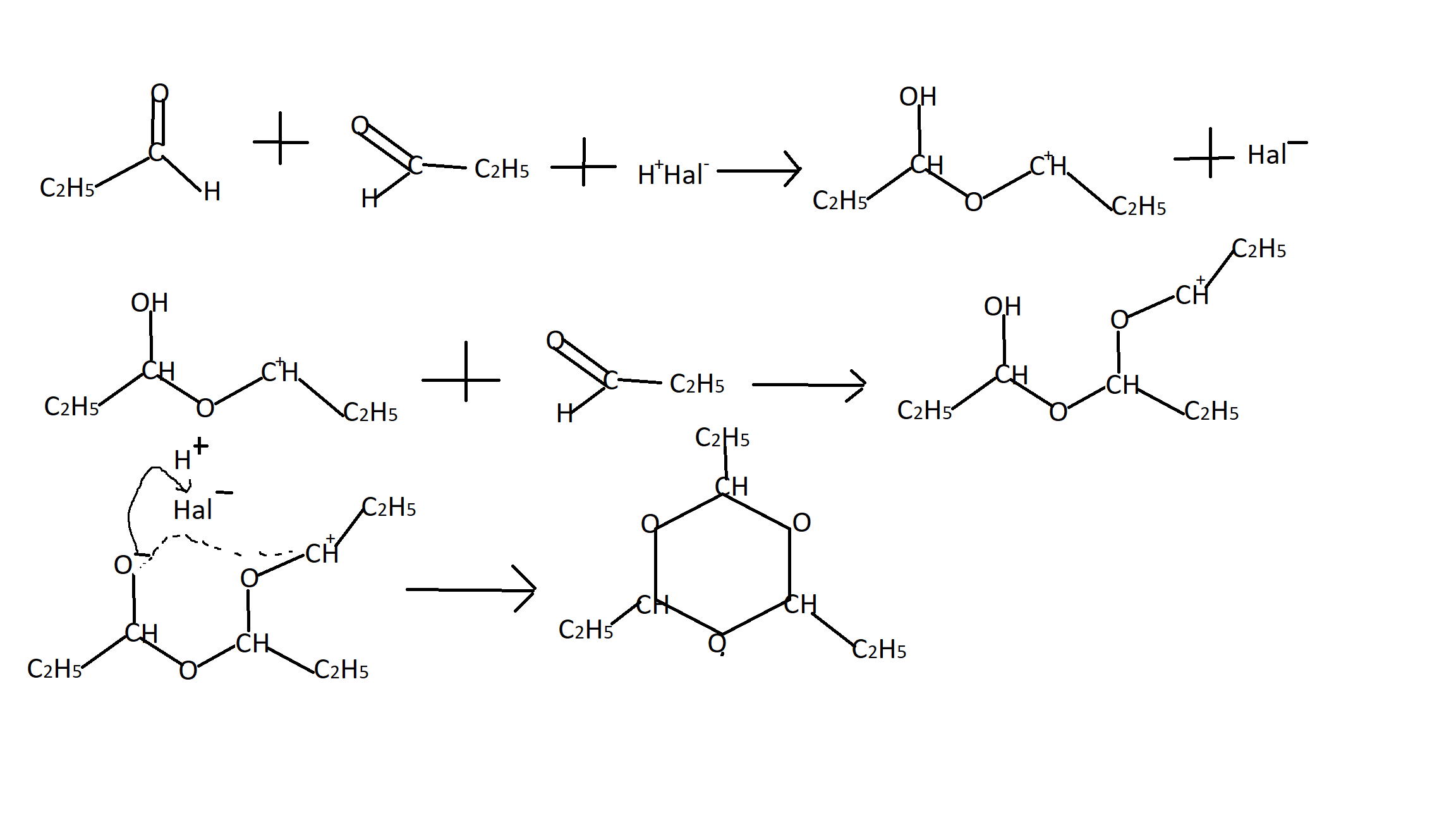 Це правильний варіант, а схожий файл використовувати не треба, бо там недописано Hal- у першому етапі